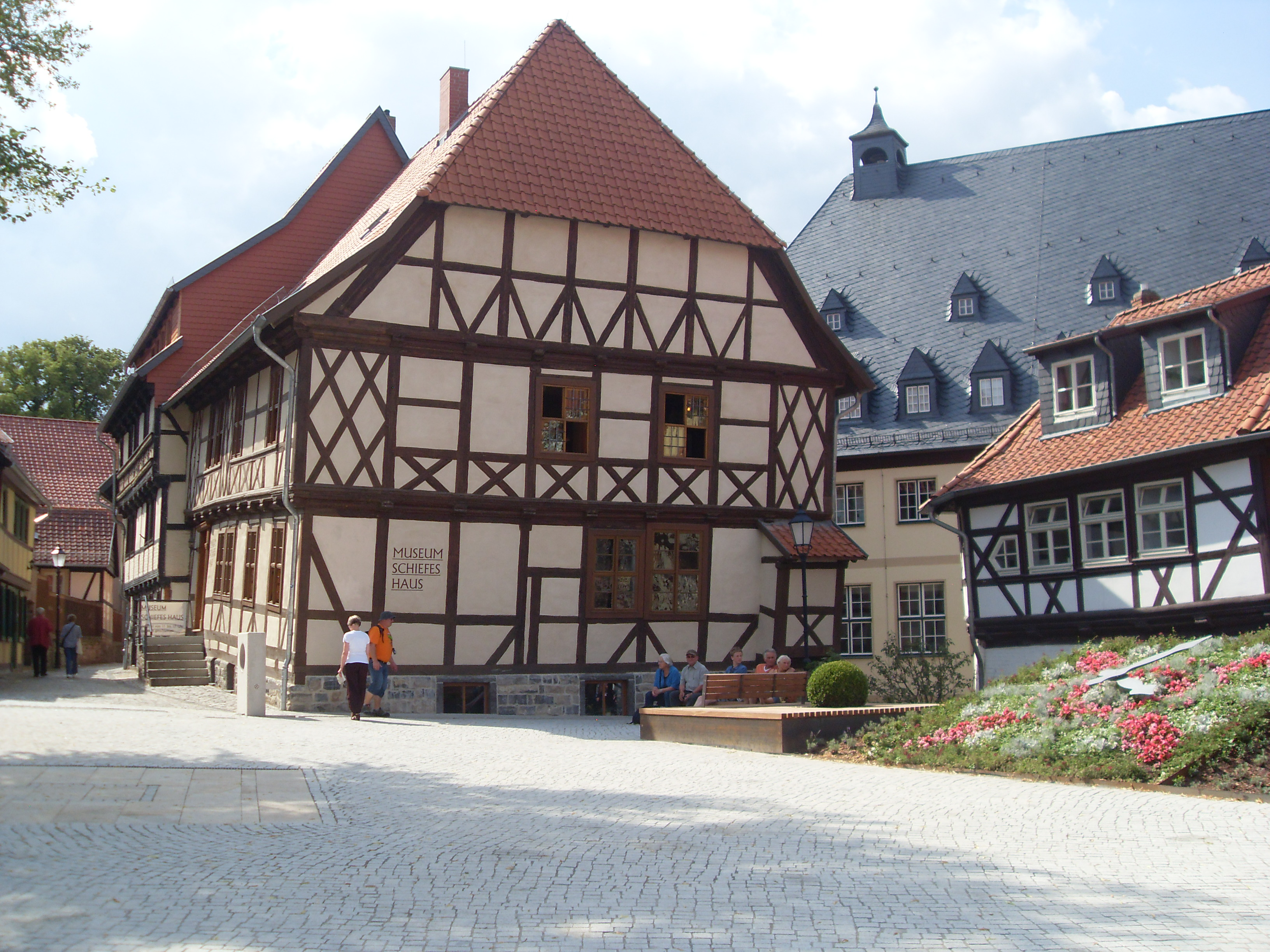 in Wernigerode